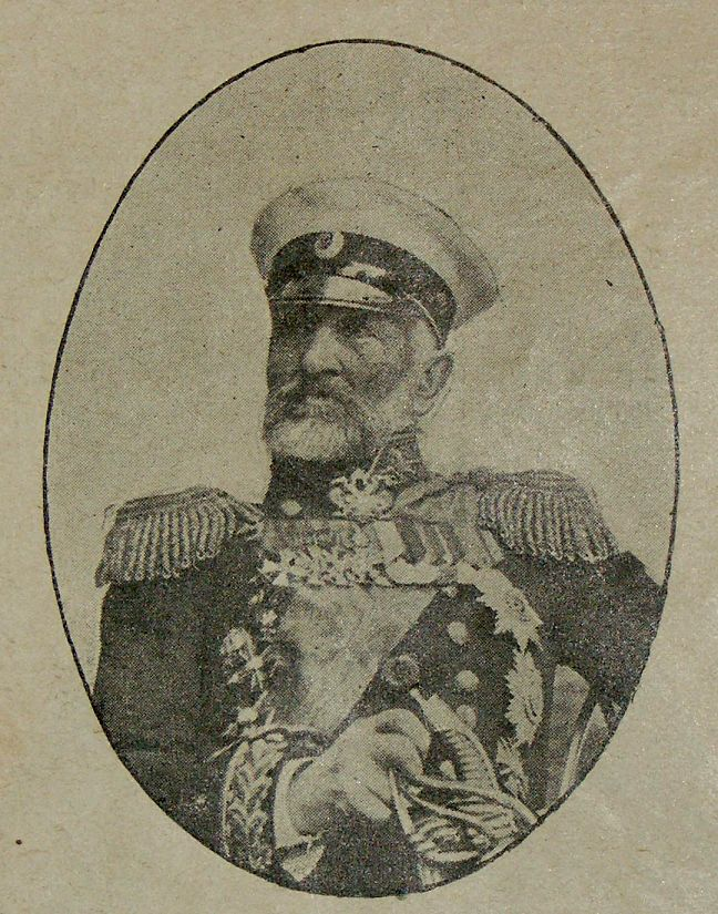 Стеценко Василий Александрович